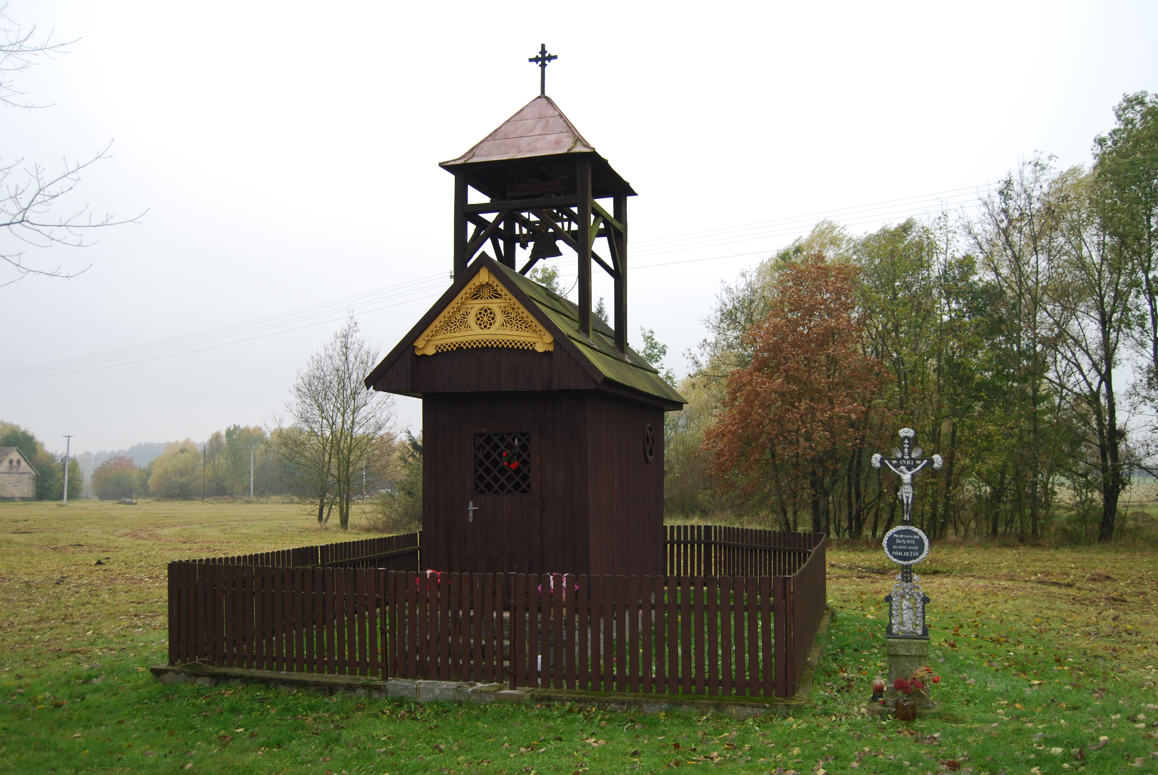 Kaple zasvěcená Panně Marii z roku 1979 v části obce Nálesí. Chyšky. Okres Písek. Česká republika.